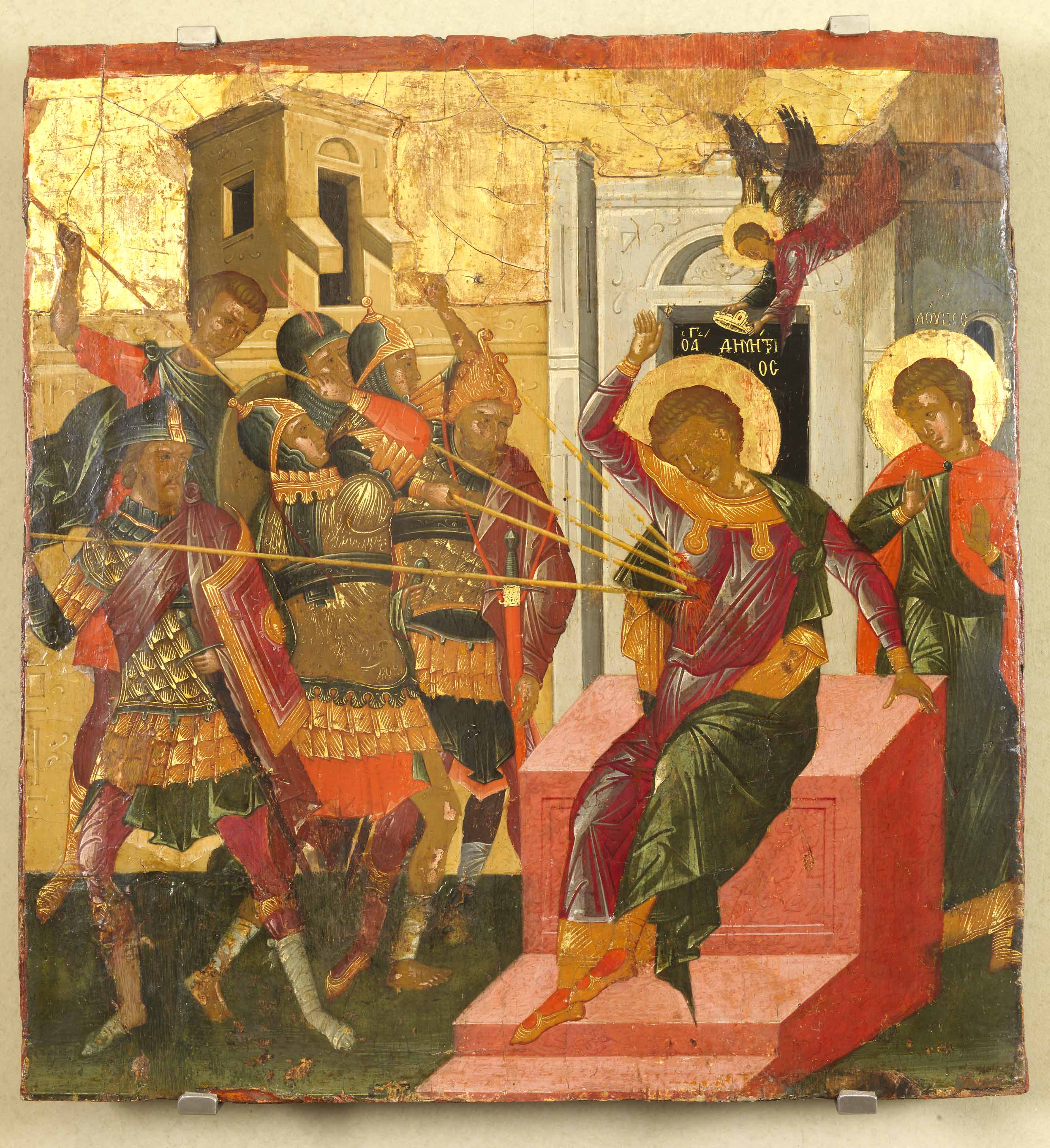 Το μαρτύριο του Αγίου Δημητρίου δεύτερο μισό 15ου αιώνα, 50,5x53εκ. άγνωστος ζωγράφος του Χάνδακα Στην εικόνα ο νεαρός άγιος Δημήτριος κάθεται σε έδρανο, στο οποίο στηρίζεται με το αριστερό του χέρι και σηκώνει το δεξί την ώρα που δέχεται τα πλήγματα από τα δόρατα των στρατιωτών, που στέκονται αριστερά. Πίσω του ο δούλος του, ο Λούπος, παρατηρεί τη σκηνή τρομαγμένος. Την ίδια στιγμή κατεβαίνει από τον ουρανό ένας άγγελος που κρατεί ένα πολύτιμο στέμμα για να στεφανώσει τον άγιο. Στο βάθος εικονίζονται ένα κτίριο που έχει πύλη με τοξωτό υπέρθυρο, καθώς και τείχος με πυργοειδές οικοδόμημα.